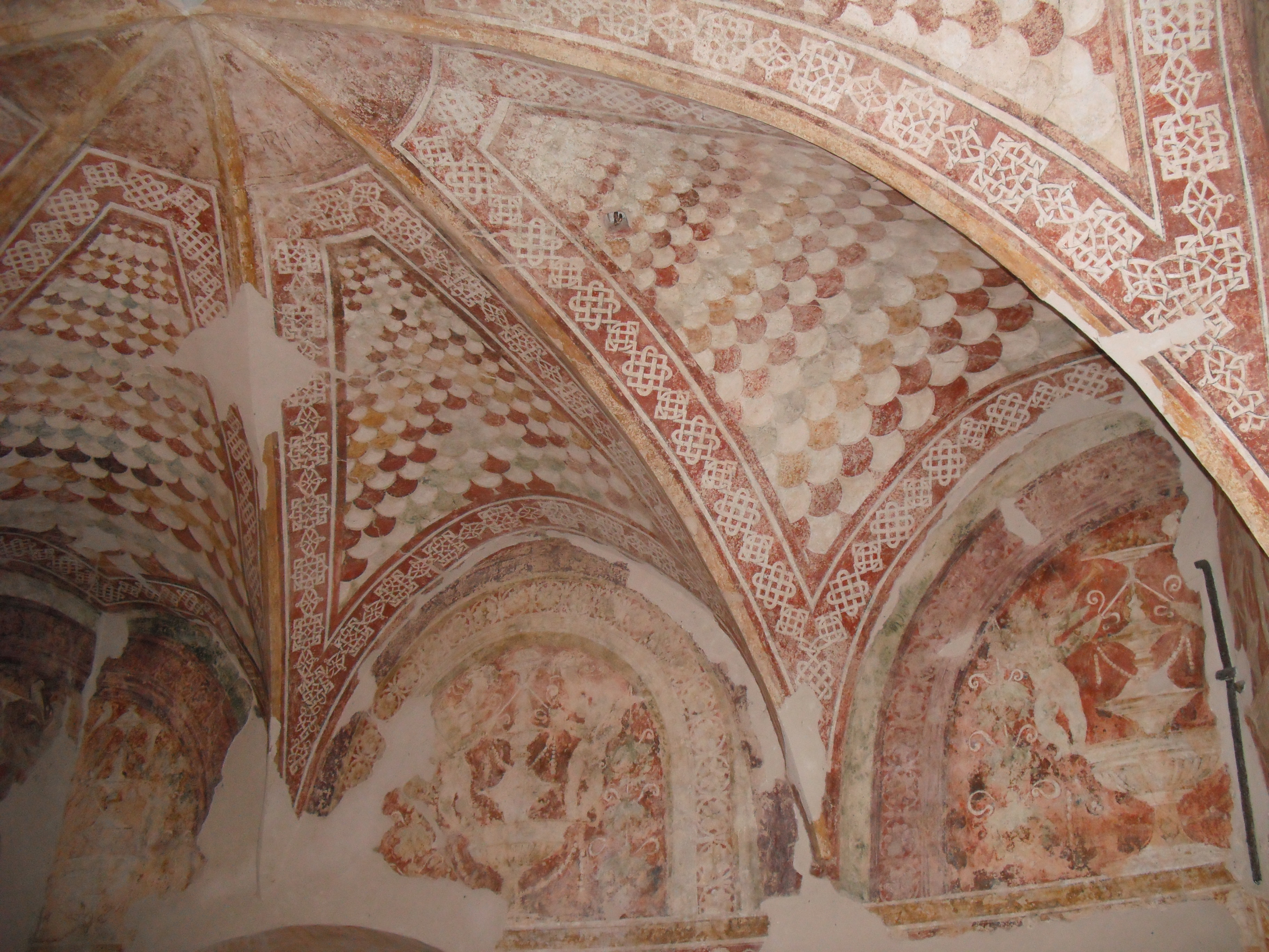 Interni cappella